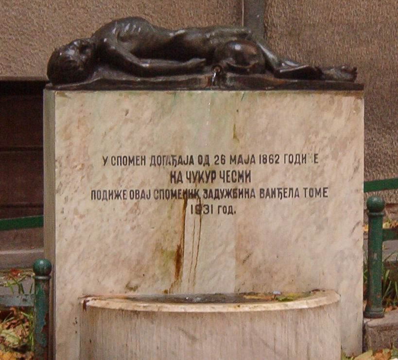 Чукур чесма у Београду, споменик сукоба са Турцима; Fotografisao Goldfinger. U javnoj upotrebi!